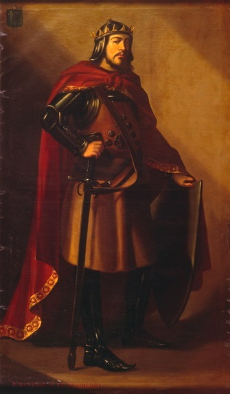 Retrato imaginario del rey García Sánchez II de Pamplona († c. 1000), que fue hijo del rey Sancho Garcés II de Pamplona y de la reina Urraca Fernández.